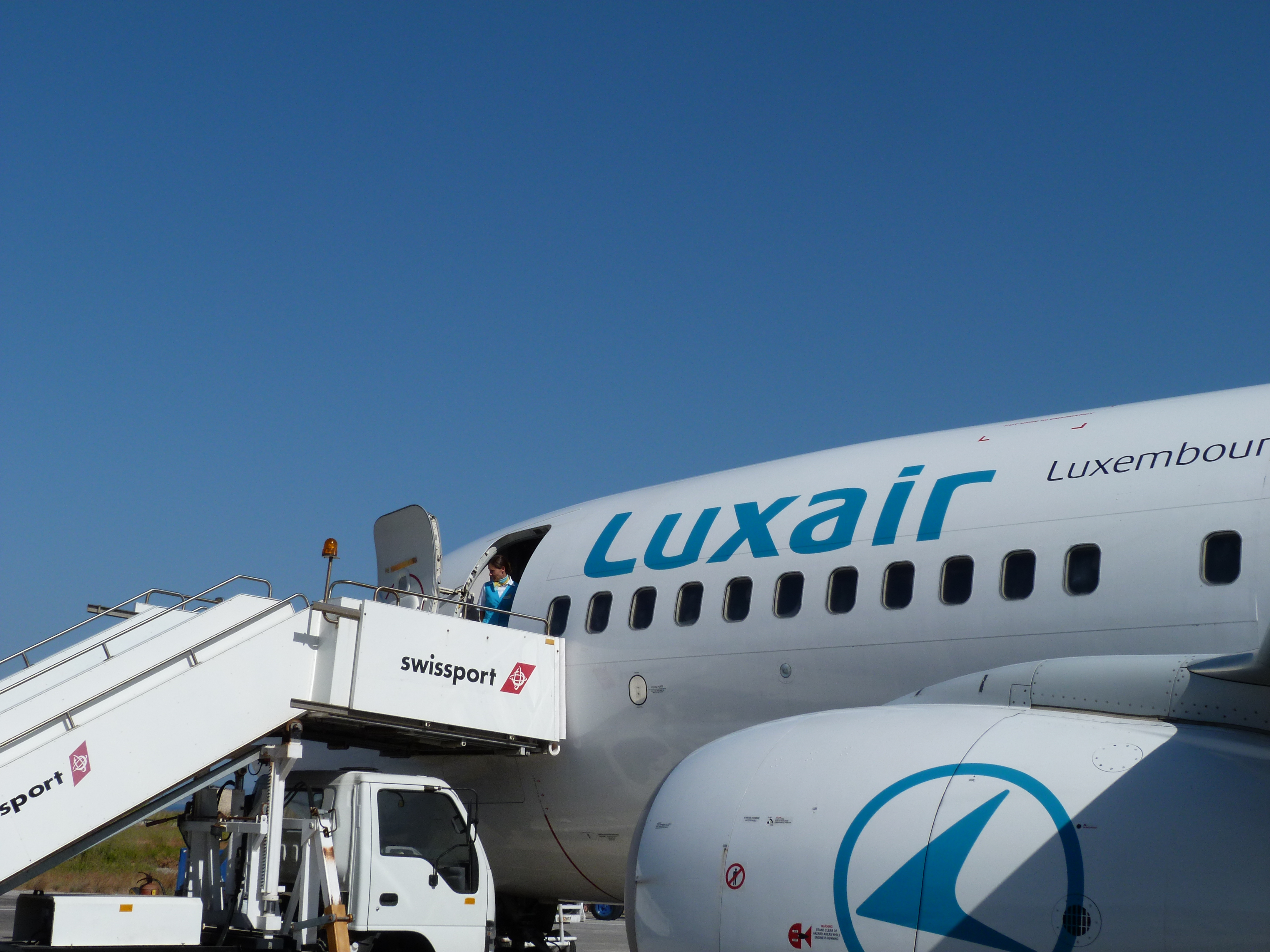 B737 - 700 Luxair